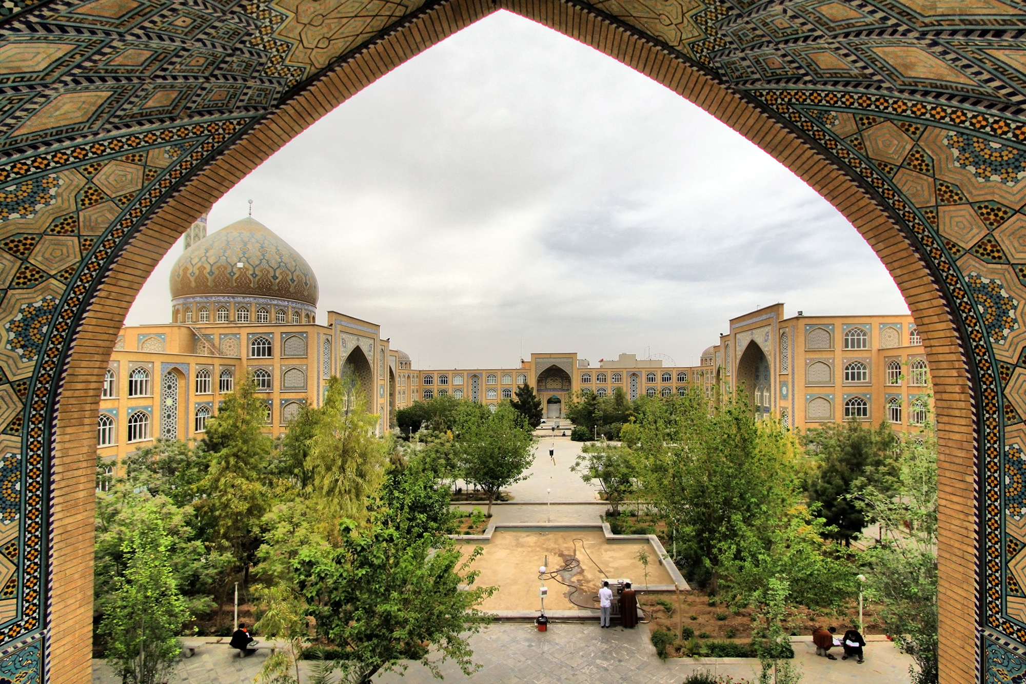 مدرسه علمیه معصومیه در سال ۱۳۶۰ به فرمان خمینی شروع و در سال ۱۳۶۸ تاسیس گردید و مدرسه علی ابن ابی طالب که قبلا در خیابان صفاییه قرار داشت به این مکان منتقل و با نام مدرسه علمیه معصومیه افتتاح گردید. ویژگی خاص این مدرسه جذب رزمندگان جنگ ایران و عراق بود که پس از آتش بس به این مدرسه آمدند. به همین دلیل نیز همواره مهمترین رکن این مدرسه بسیج آن بوده‌است و در تمامی راهپیمایی‌ها تجمعات حمایت از نظام،مستضعفین جهان و مقابله با استکبار جهانی حضور داشته اند. دهها نفر از طلاب سابق بسیجی این مدرسه مؤسس مؤسسات فرهنگی و آموزشی بوده‌اند. این مدرسه در حال حاضر بیش از 1000 نفر طلبه در پایه‌های ۱ تا ۶ حوزه دارد. این عکس در سال 2011 میلادی از این مدرسه گرفته شده است که به حالت اچ دی آر عکاسی شده.